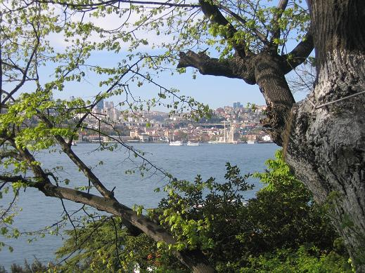 Fethipaşa Korusu, İstanbul